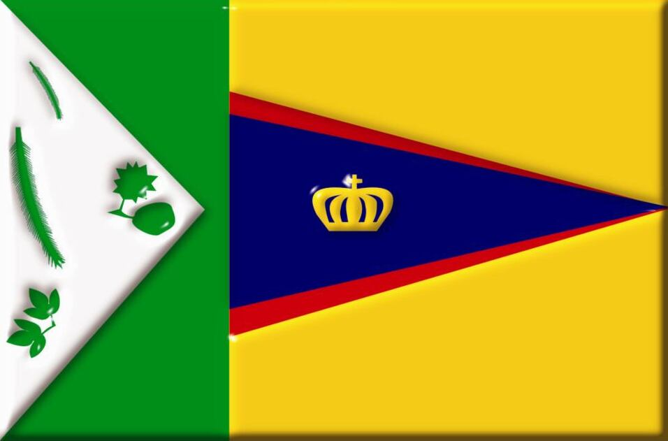 Bandeira do Município de Cansanção, Estado da Bahia, Brasil.